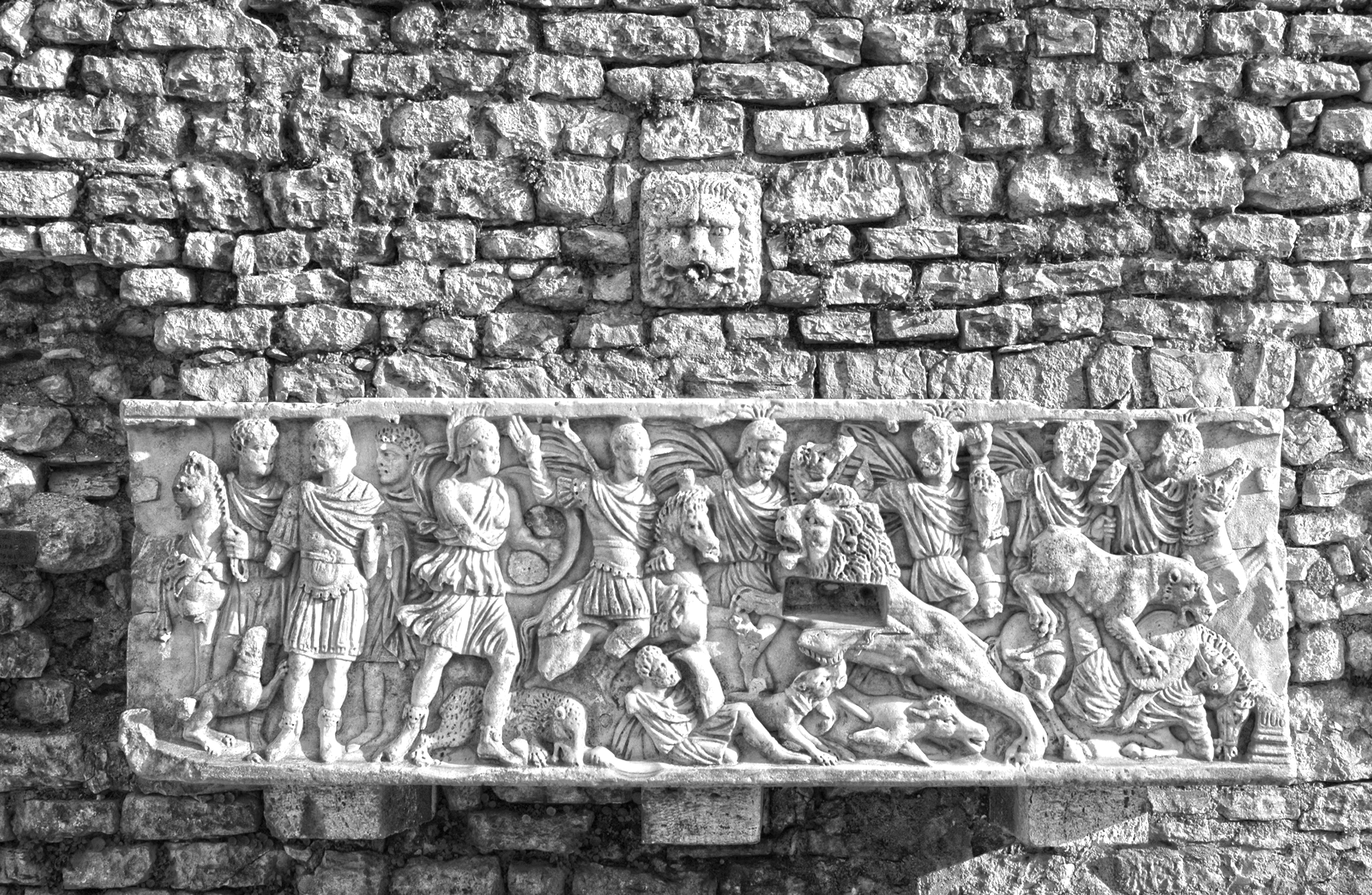 Fontana di piazza del Duomo Un antico sarcofago con altorilievi funge da vasca di raccolta della fontana di piazza del Duomo di Spoleto. Si trovava in palazzo Campello finché nel 1954 l'arcivescovo Raffaele Mario Radossi lo fece montare nel sito attuale. Il filmato che ci offre è una scena di caccia in Africa, che si legge da sinistra. Le prime due figure sono il cacciatore, ancora a piedi, col cavallo alla briglia, ed il suo servo col cane. Subito dopo il cacciatore è ormai in sella, il servo brandisce lo scudo ed il cane fiuta. Terza scena: lotta col leone e con la leonessa.